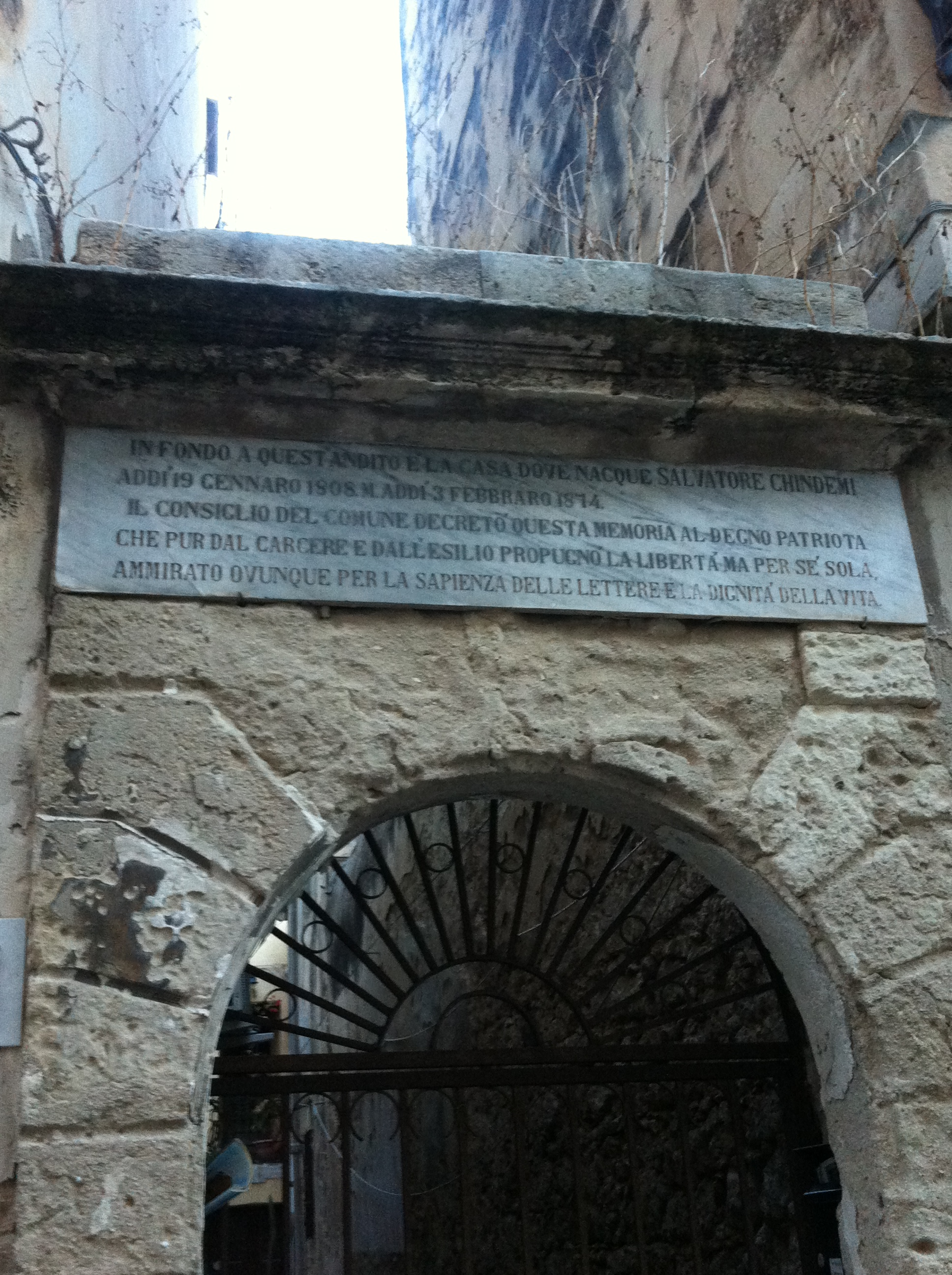 Lapide casa natale di Slavatore Chindemi, patriota di Siracusa.